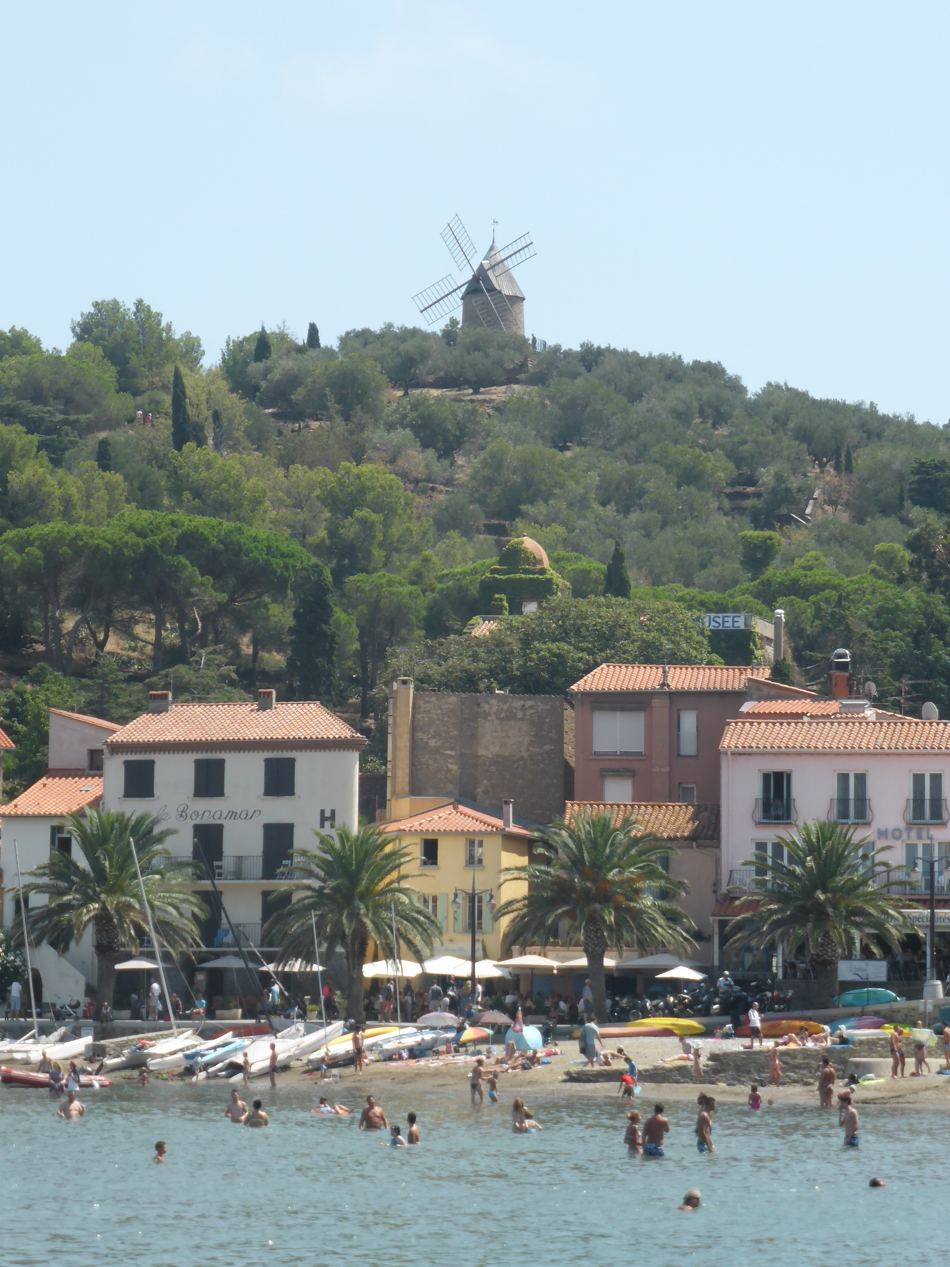 Plage de Collioure et vue sur le jardin Pams